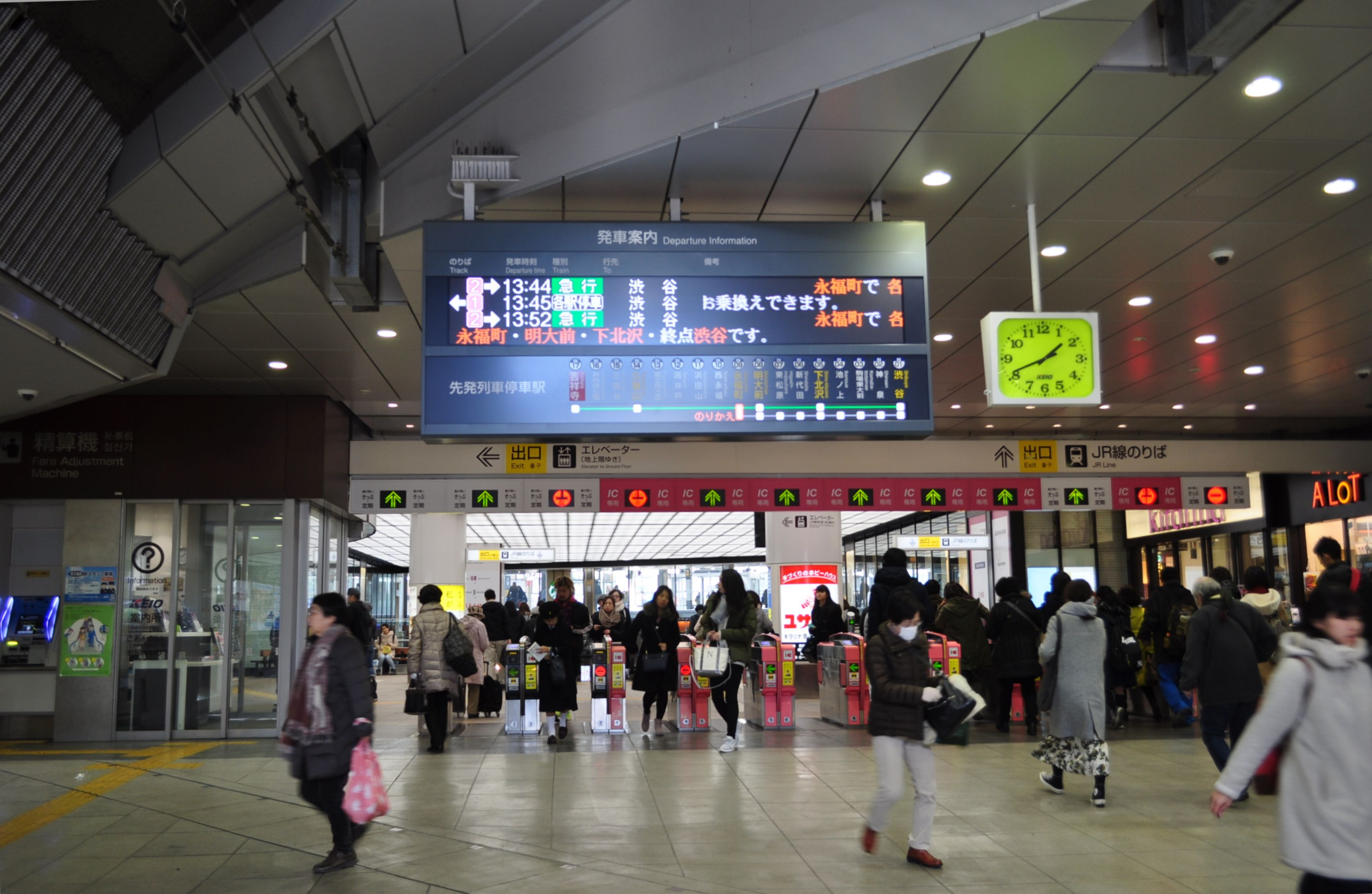 井の頭線 吉祥寺駅 Nikon D5000